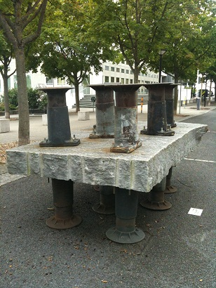 Tamponneuse, 2006, Pavel Schmidt, Neuchâtel